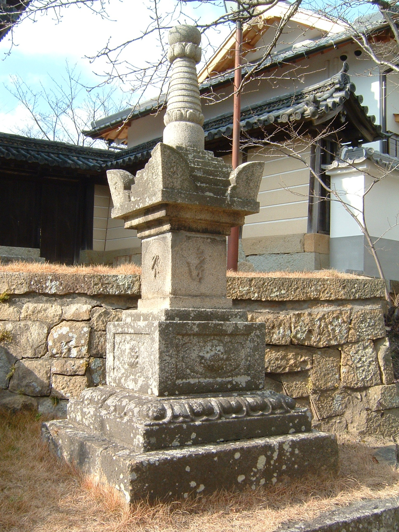 時光寺